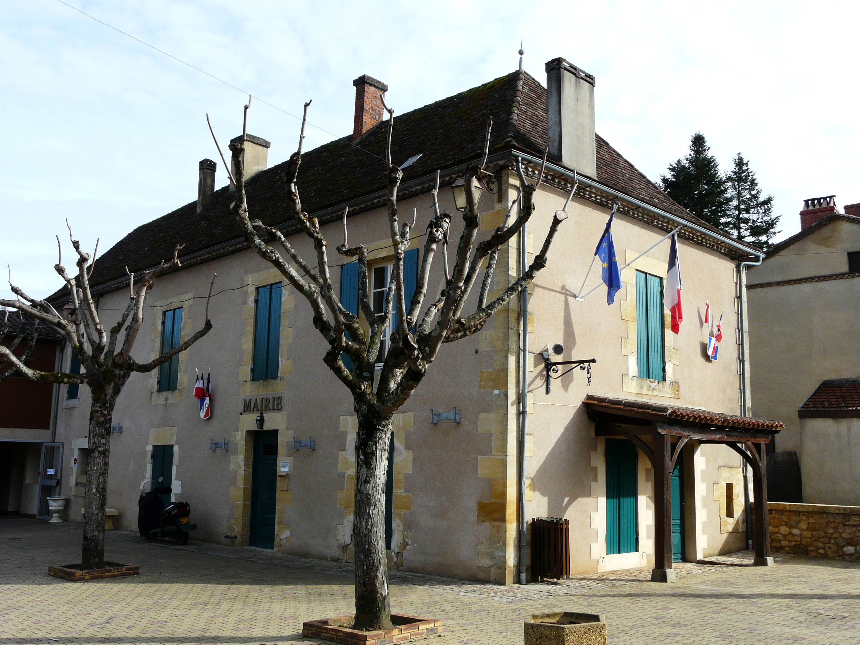 La mairie de Saint-Sauveur, Dordogne, France.